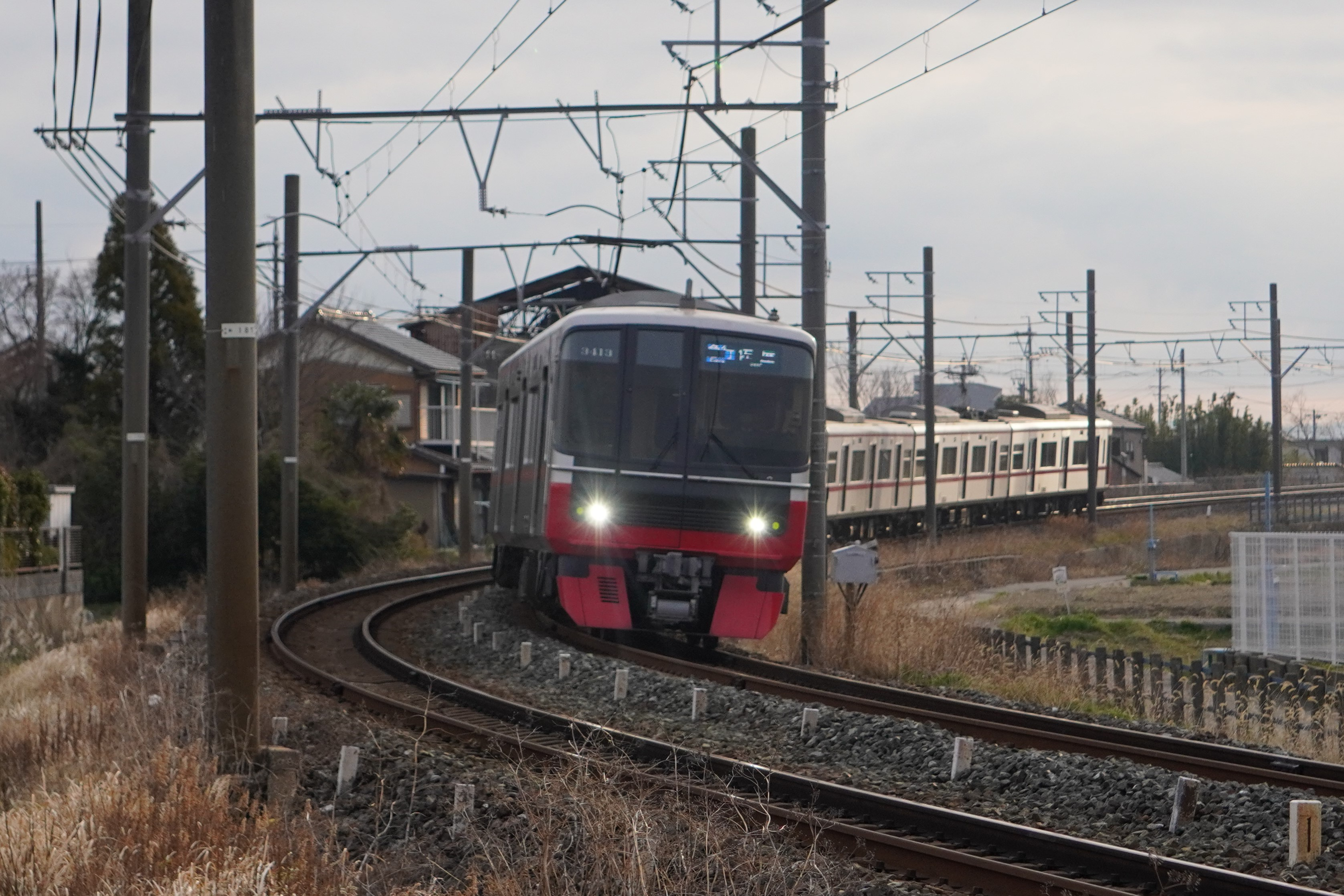 3300系による佐屋行き急行。